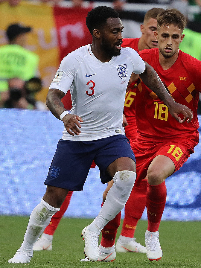 Второй состав сборной Бельгии оказался сильнее резерва англичан на ЧМ-2018